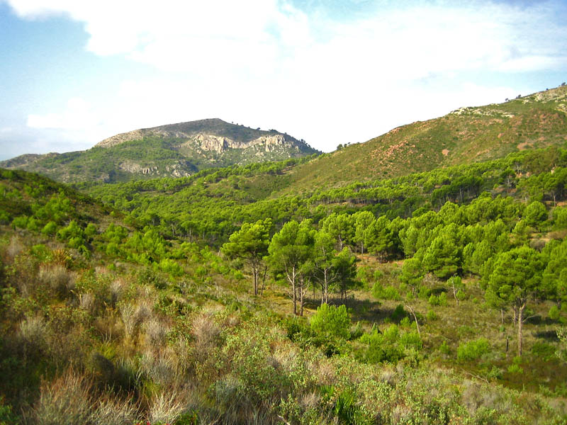 Bosc al Desert de les Palmes, Castelló de la Plana